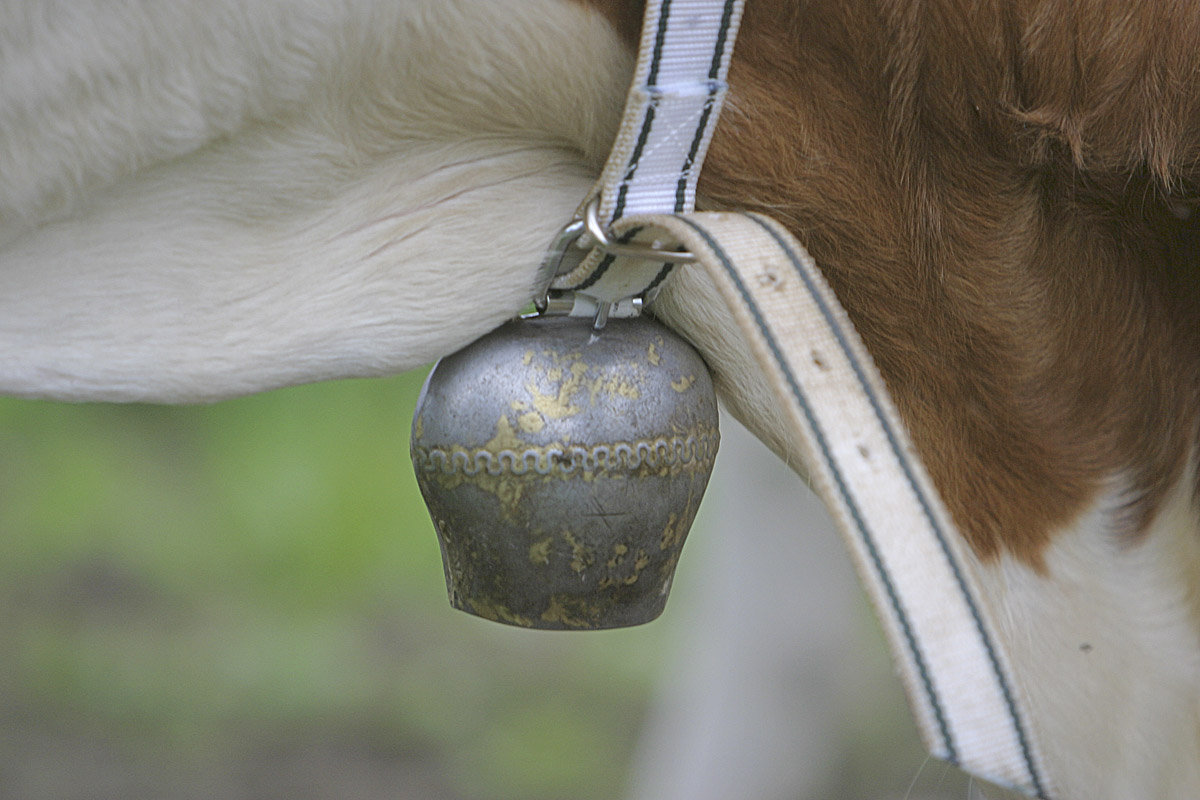 Kuhglocke, Voralpen, Pielachtal